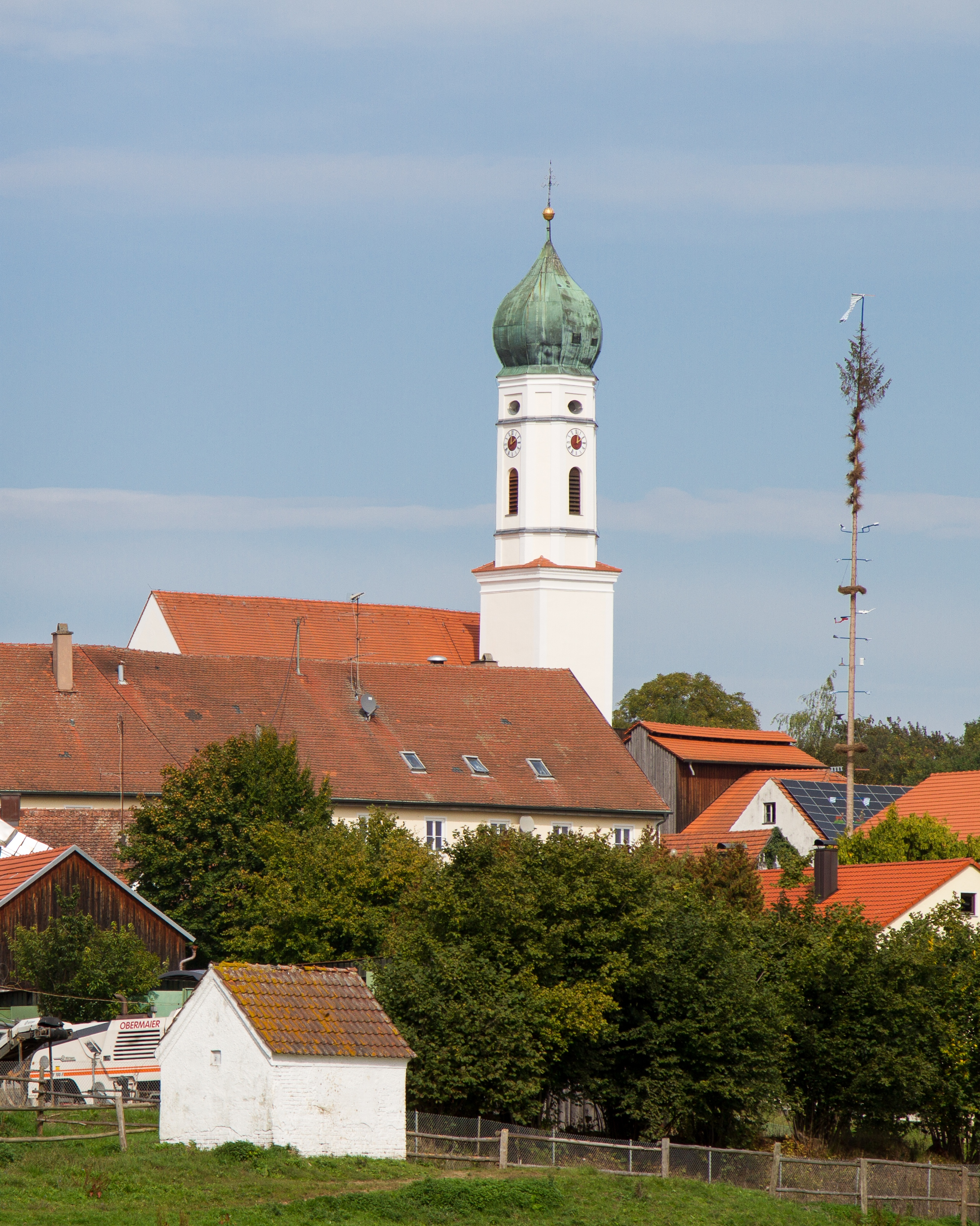 Kath. Pfarrkirche St. Emmeram, verputzte Saalkirche mit leicht eingezogenem, polygonalem Chor und seitlichem Turm mit Zwiebelhaube, flachgedecktes Langhaus mit Hohlkehle und Chor mit Netzgewölbe, Chor um 1500, Langhaus 18. Jh.; mit Ausstattung.This is a photograph of an architectural monument.